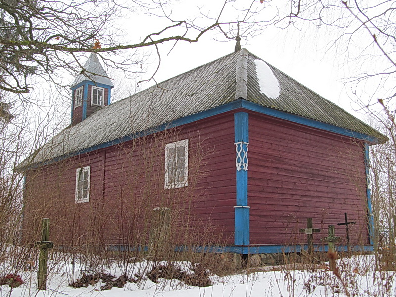 Чапунь. Царква Святой Варвары